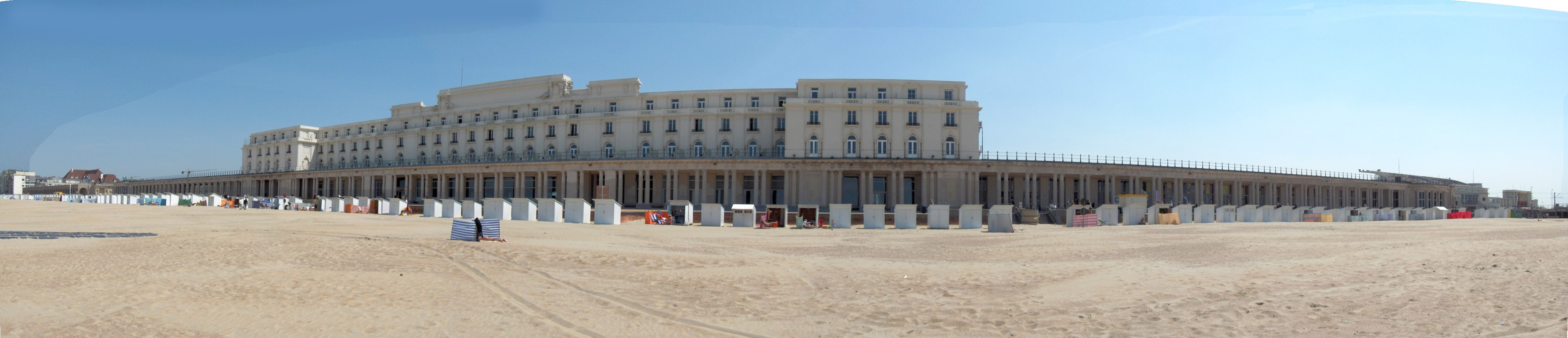 Koninklijke Gaanderijen met Thermae Palace hotel, gezien van het strand. Koninklijke Gaanderijen, as seen from the beach. Ostend, Belgium. Panoramic view.